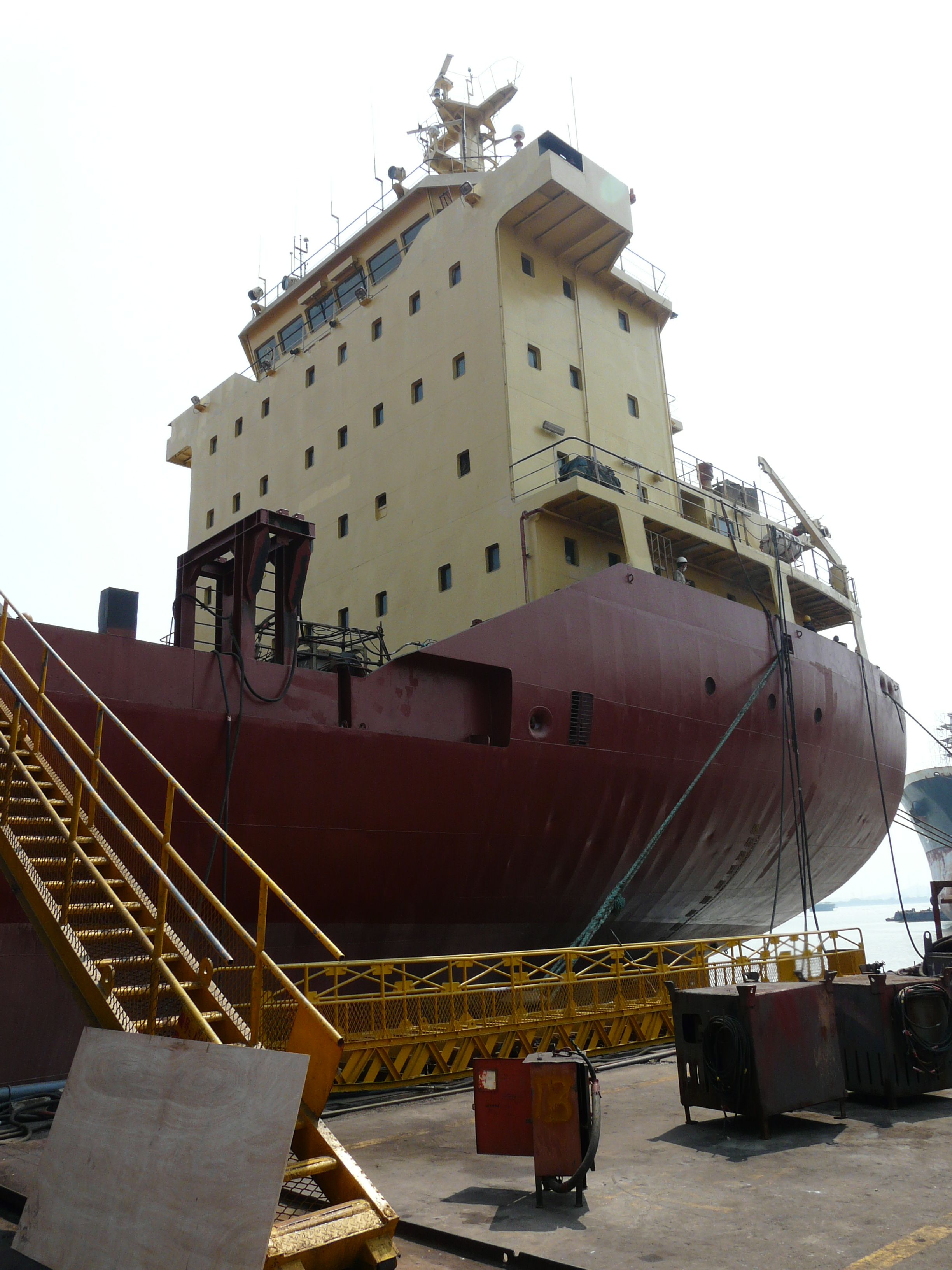 Т/х "Don Max" у причала судоремонтного завода в Huandao (Китай) 18 мая 2011 года. Судно имеет сообщение с берегом через заводскую сходню со ступеньками тяжёлого исполнения.